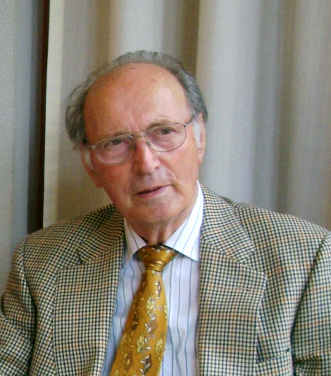 Wilhelm Lauer im Alter von 83 Jahren